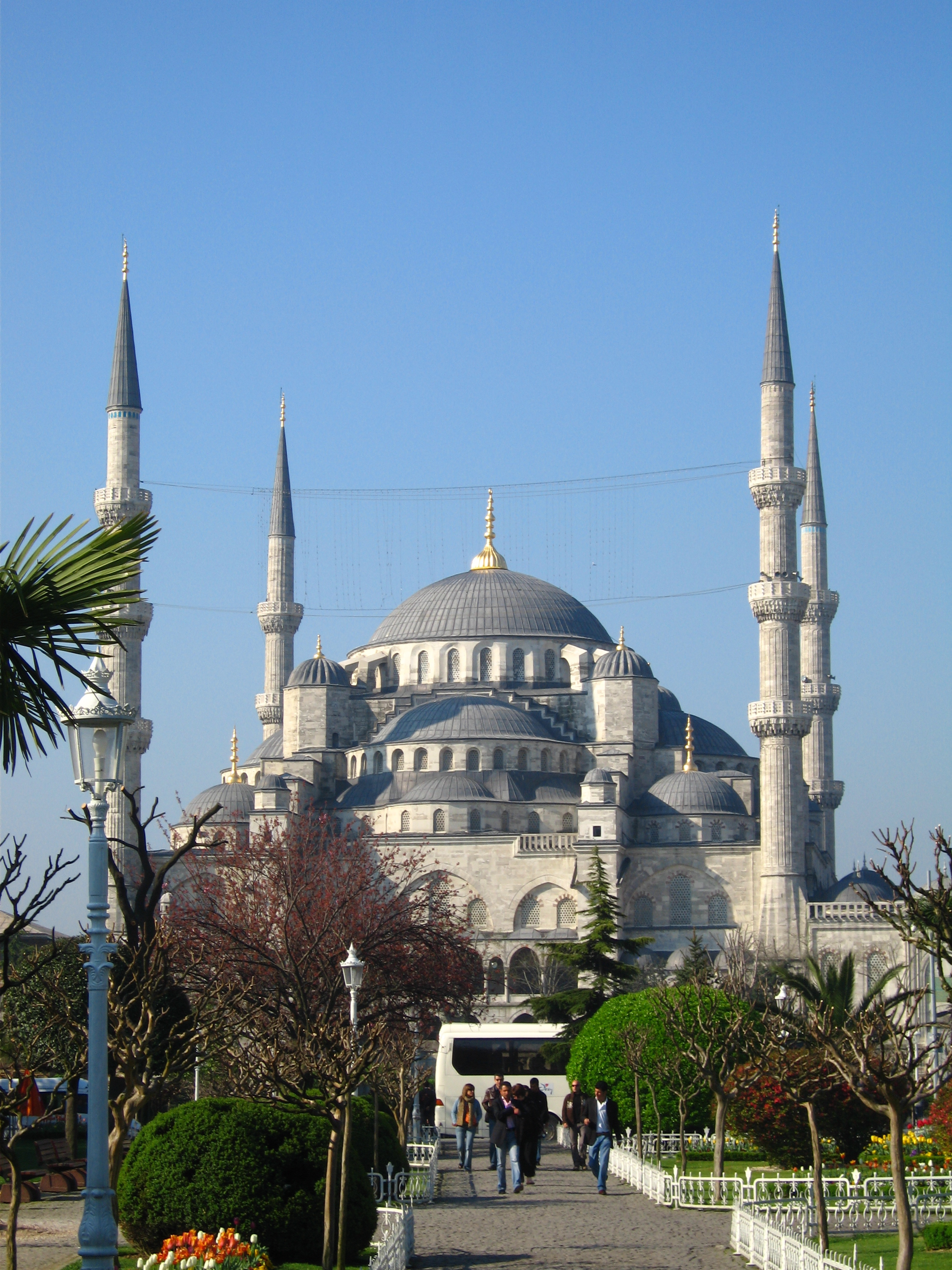 The Sultan Ahmet Mosque / Blue Mosque in Istanbul, turkey